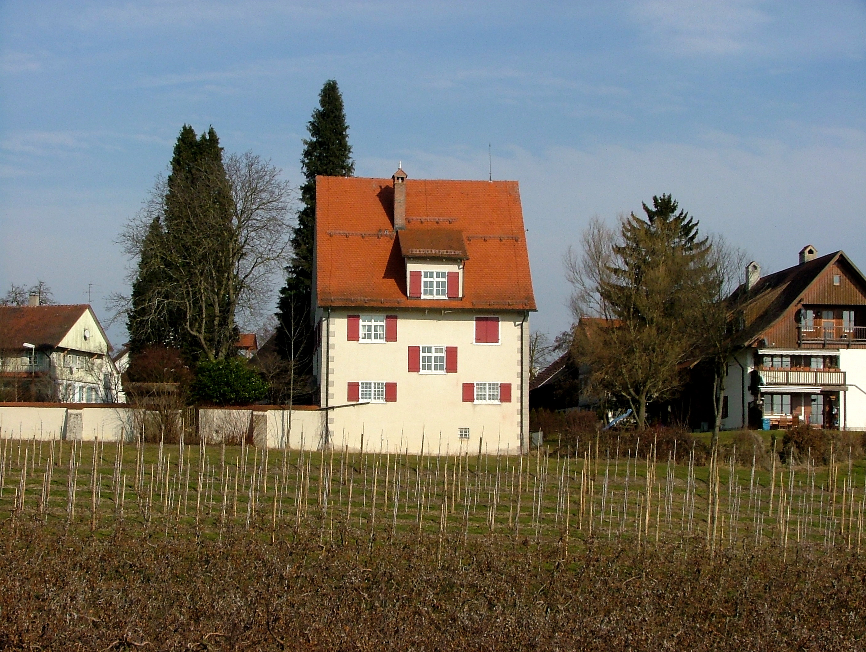 Unterreitnau